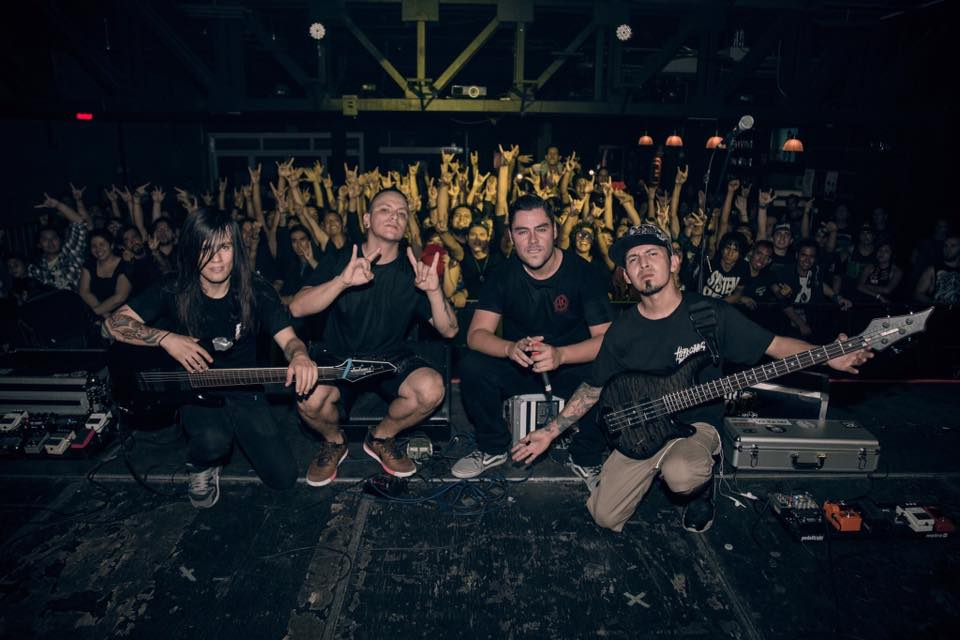 HCTK Guadalajara Jalisco, Mexico. C3 Stage